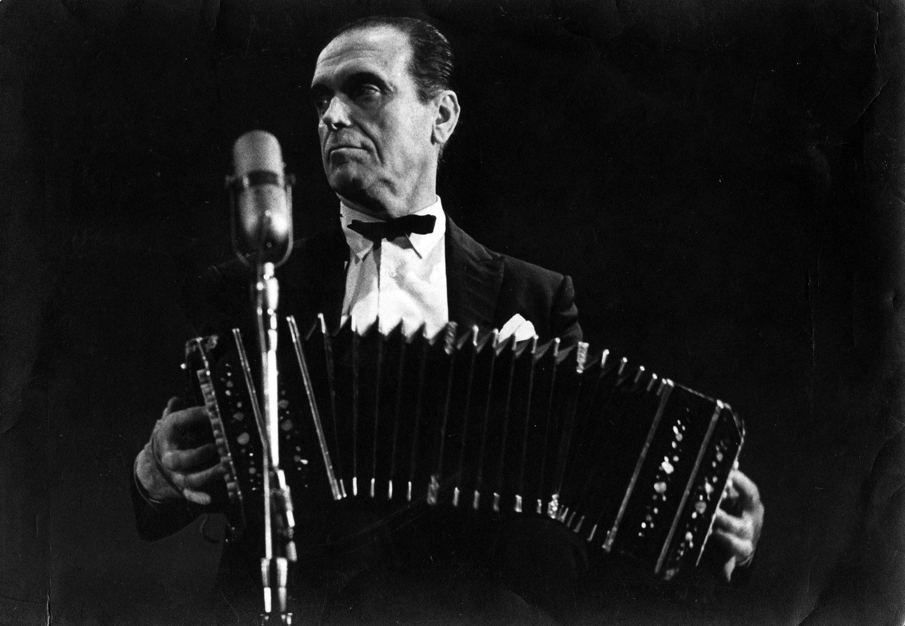 Pedro Laurenz en Japon